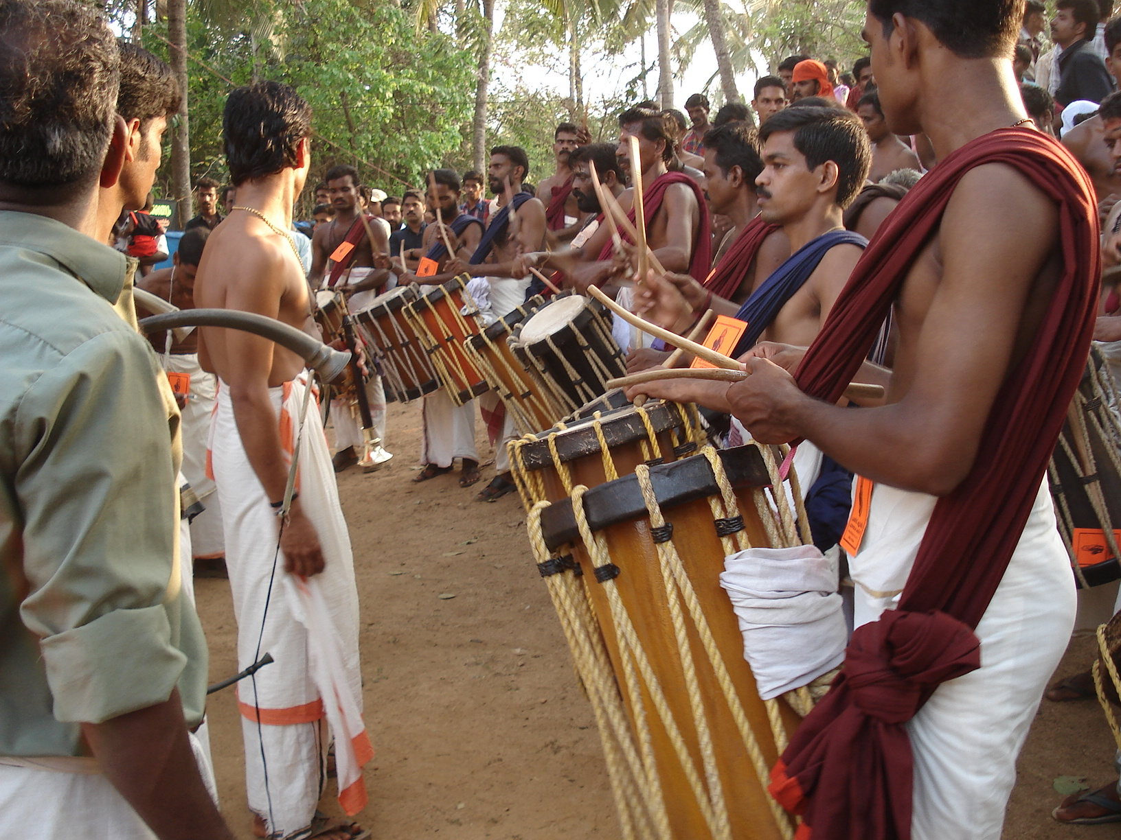 Melam, Chirankara Pooram